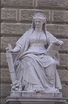 Plastike pred predsedstvom. Alegorija zakona.